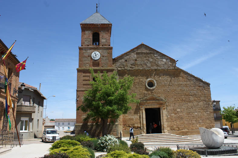 Parroquia de San Juan Degollado, Gordoncillo (León)